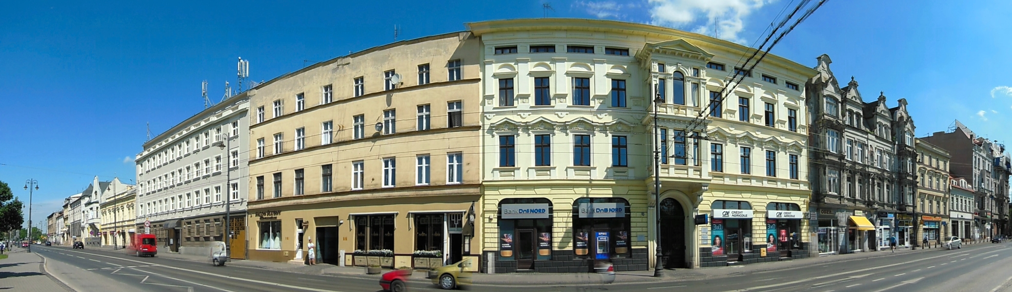 Ulica Ferdynanda Focha w Bydgoszczy